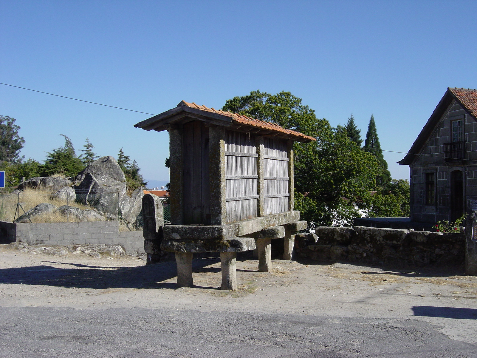 Espigueiro em Guardão (Tondela, Viseu)